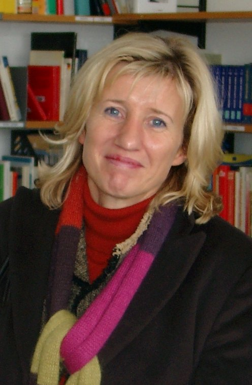 Ines Geipel, visit at the CJD Christophorusschule Königswinter